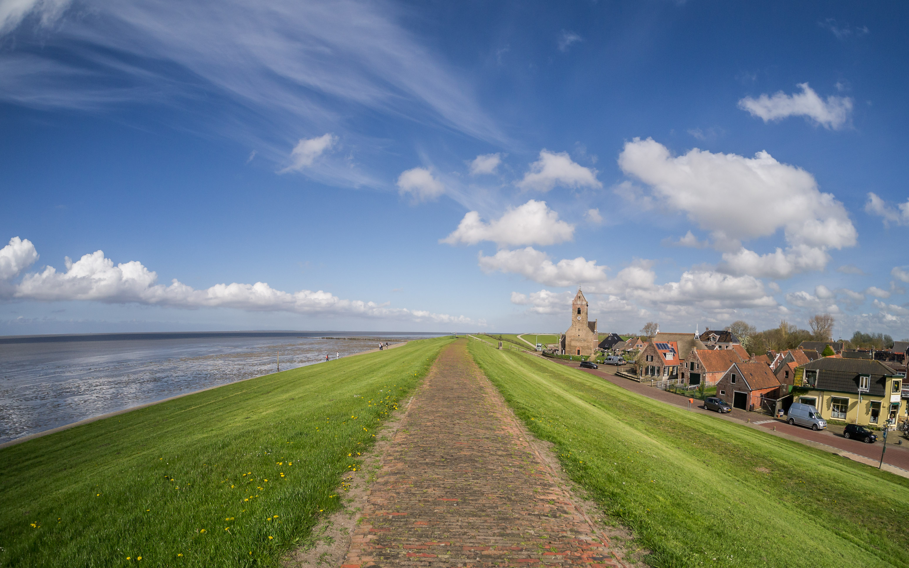 De Mariakerk van Wierum achter de zeedijk